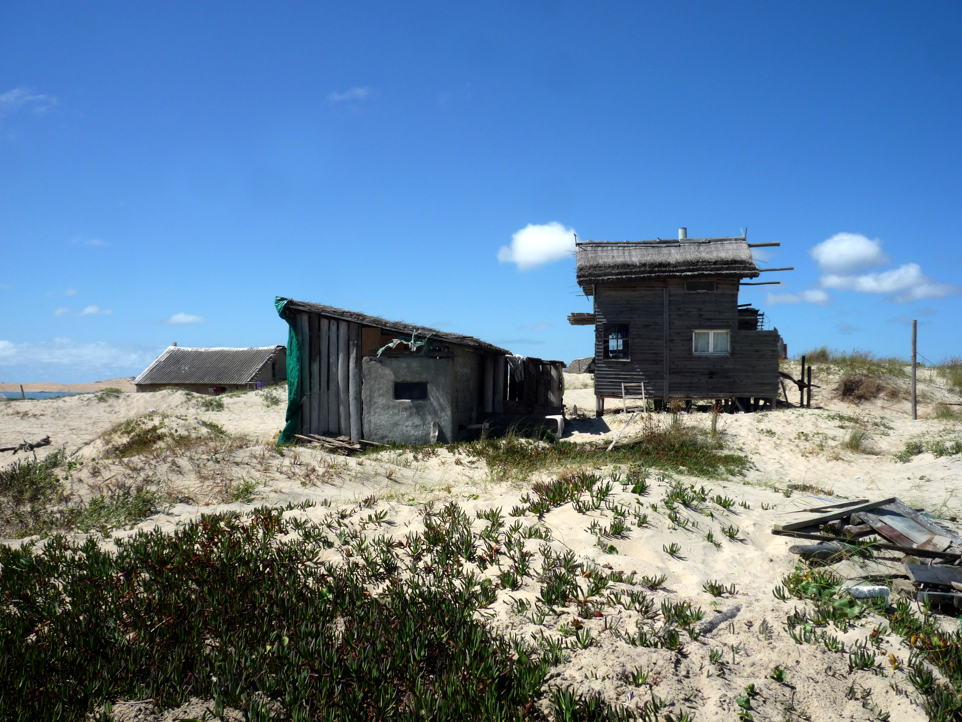 Ranchos de la Playa de Valizas (Uruguay)